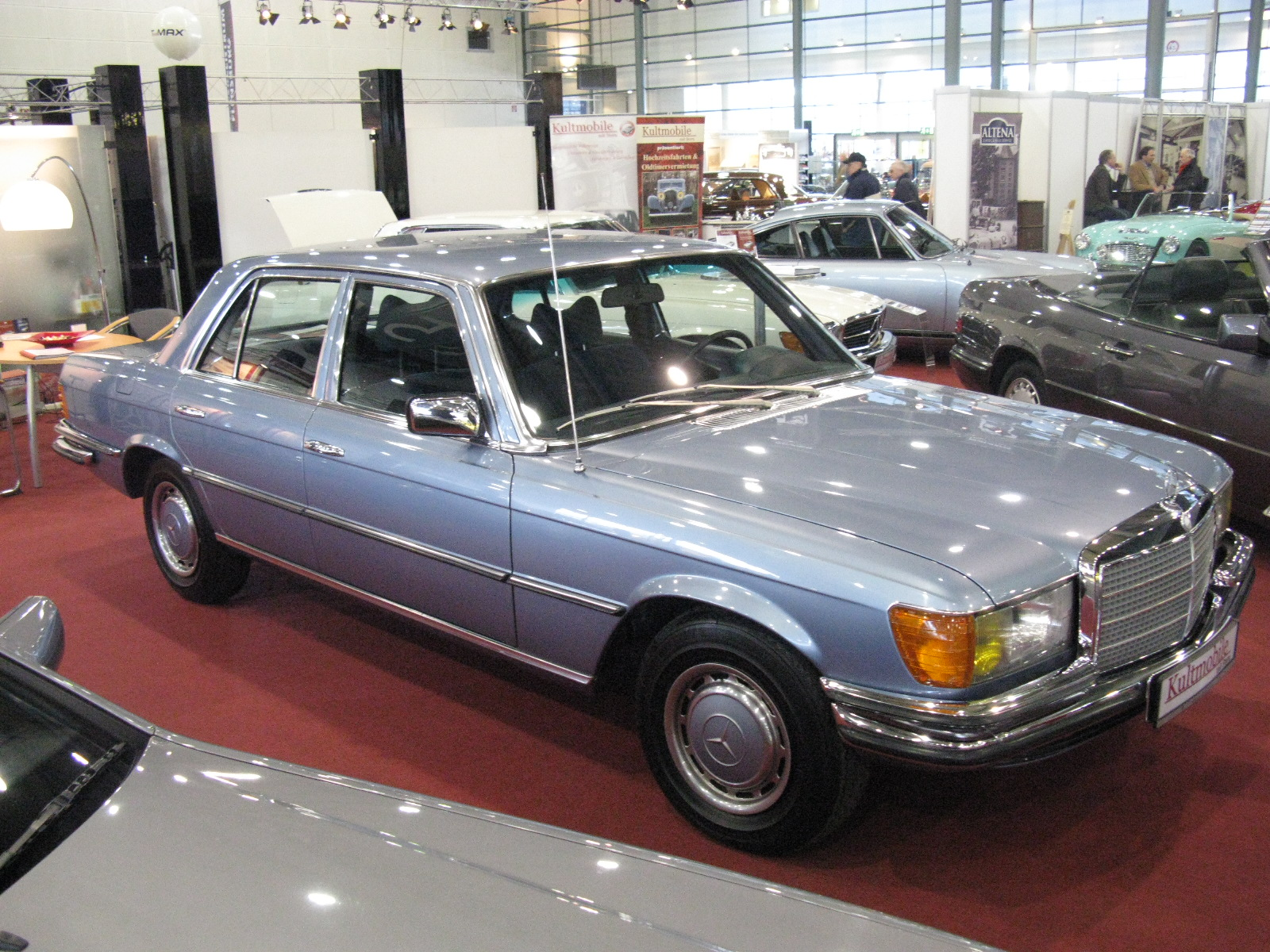 Mercedes-Benz 280 SE